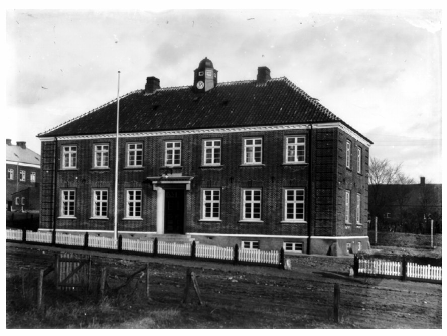 Hadsund politigaard i1919